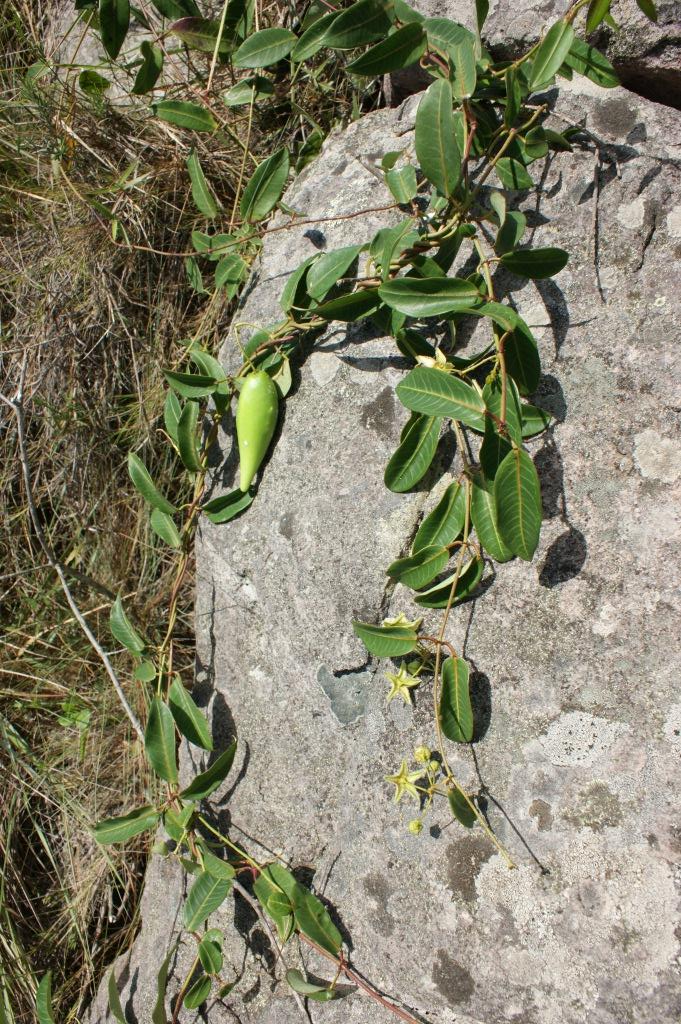 Blepharodon pictum (Vahl) W.D.Stevens - APOCYNACEAE - Chapada Diamantina - Parque Natural Municipal Morro do Pai Inácio - Palmeiras - Bahia - Brasil.